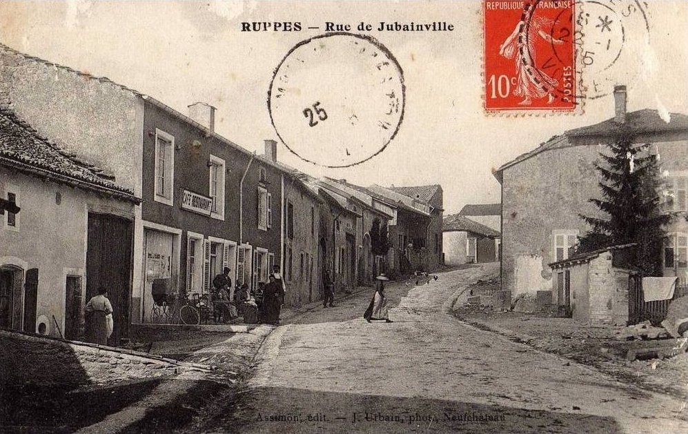 Carte postale de 1915: la rue de Jubainville